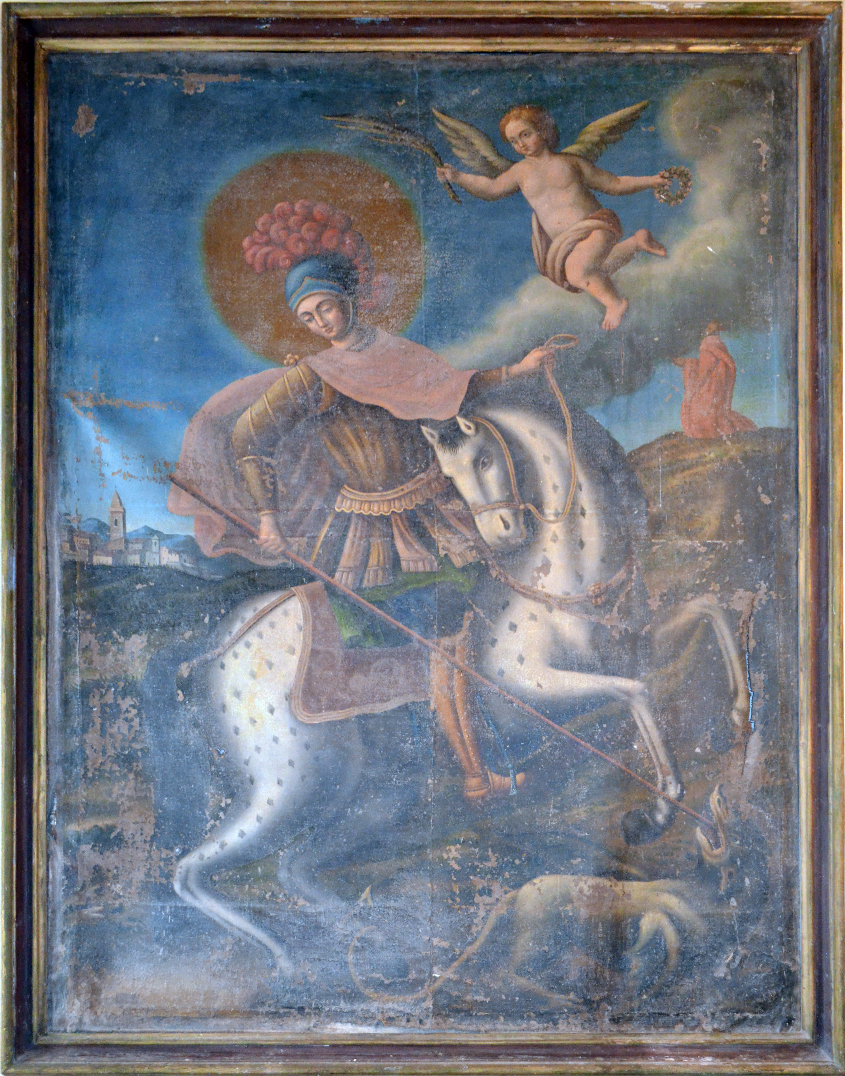 Tela anonima del XVII-XVIII rappresemtamte San Giorgio nell'atto di uccidere il drago appartenente alla chiesa di San Giorgio a Terracino nel comune di Accumoli